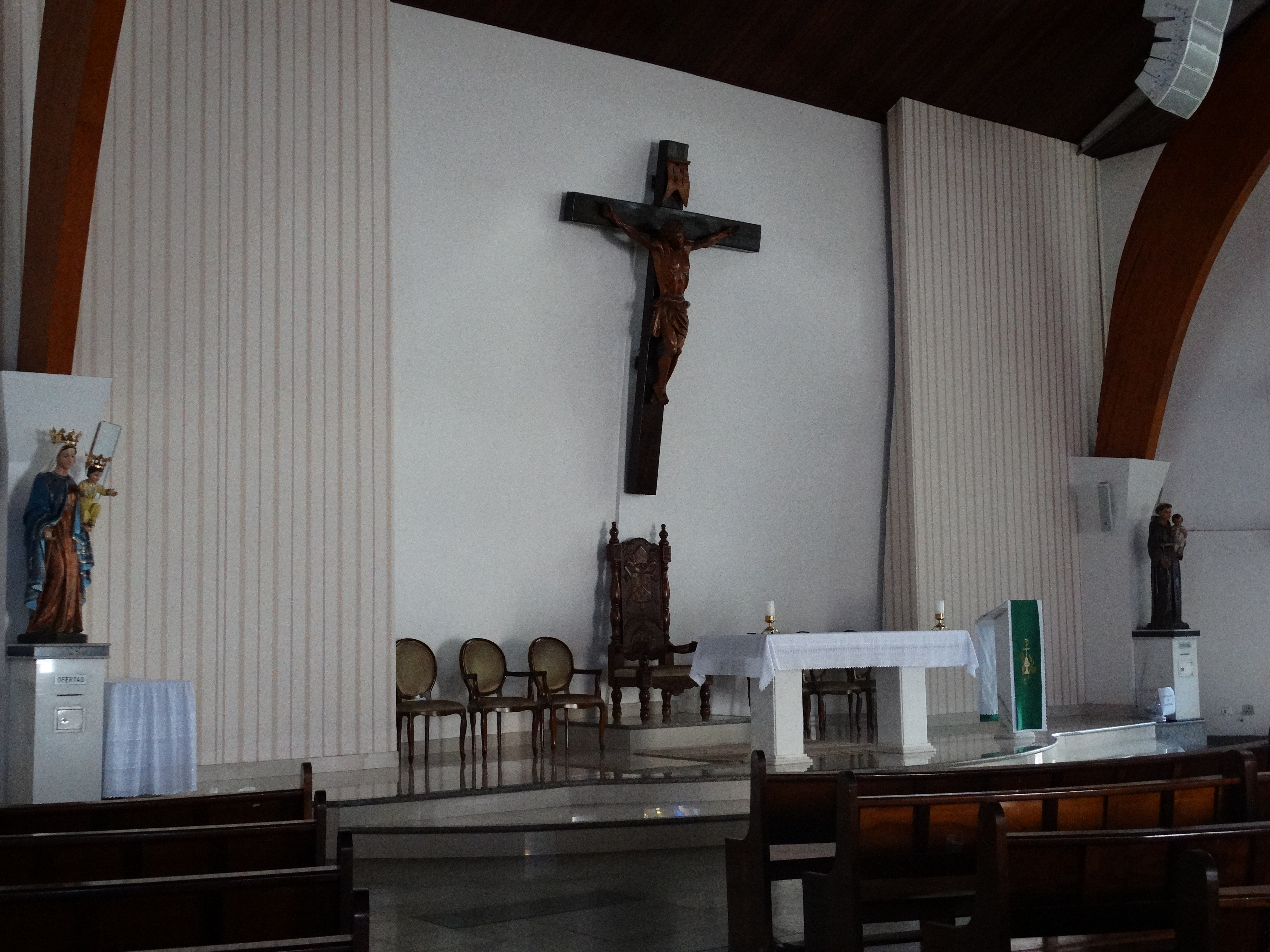 Cátedra arquiepiscopal na Catedral Metropolitana Nossa Senhora da Abadia e Santo Antônio